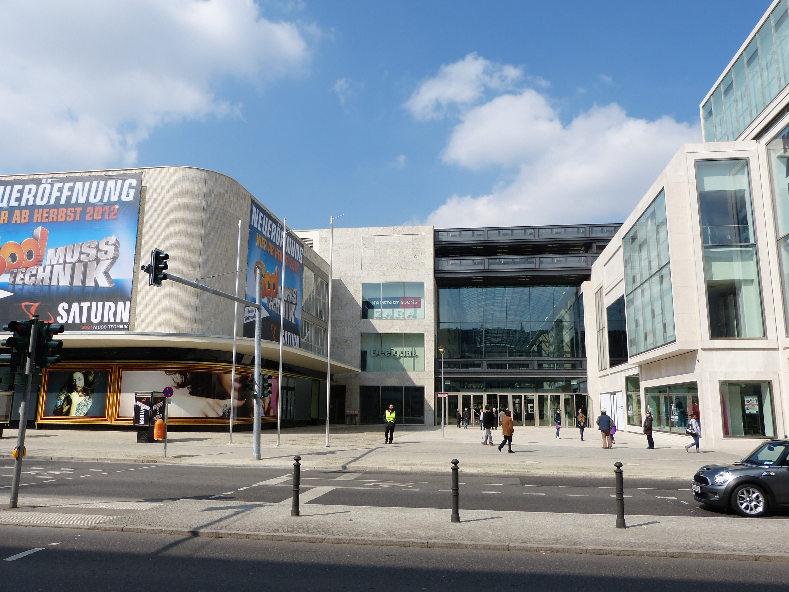 Boulevard Berlin, Einkaufszentrum an der Schloßstraße in Berlin-Steglitz; denkmalgeschützte Front (ehem. Kaufhaus Wertheim); hier: Eingang zur Passage Treitschkestraße; eröffnet am 4. April 2012